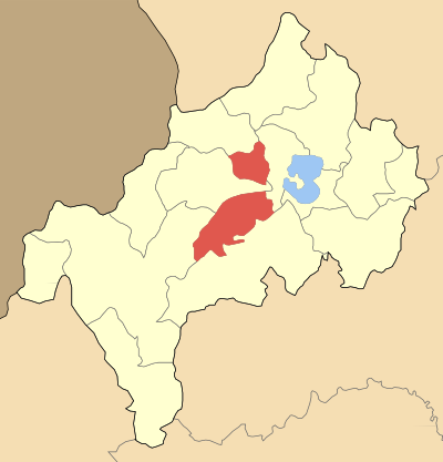 Дем Света Троица на картата на Ном Костур, Гърция Locator map of Agias Triados municipality (Δήμος Αγίας Τριάδος) at Kastoria perfecture, Greece).